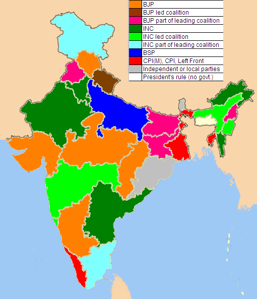 Altered colors as per latest political scenario.